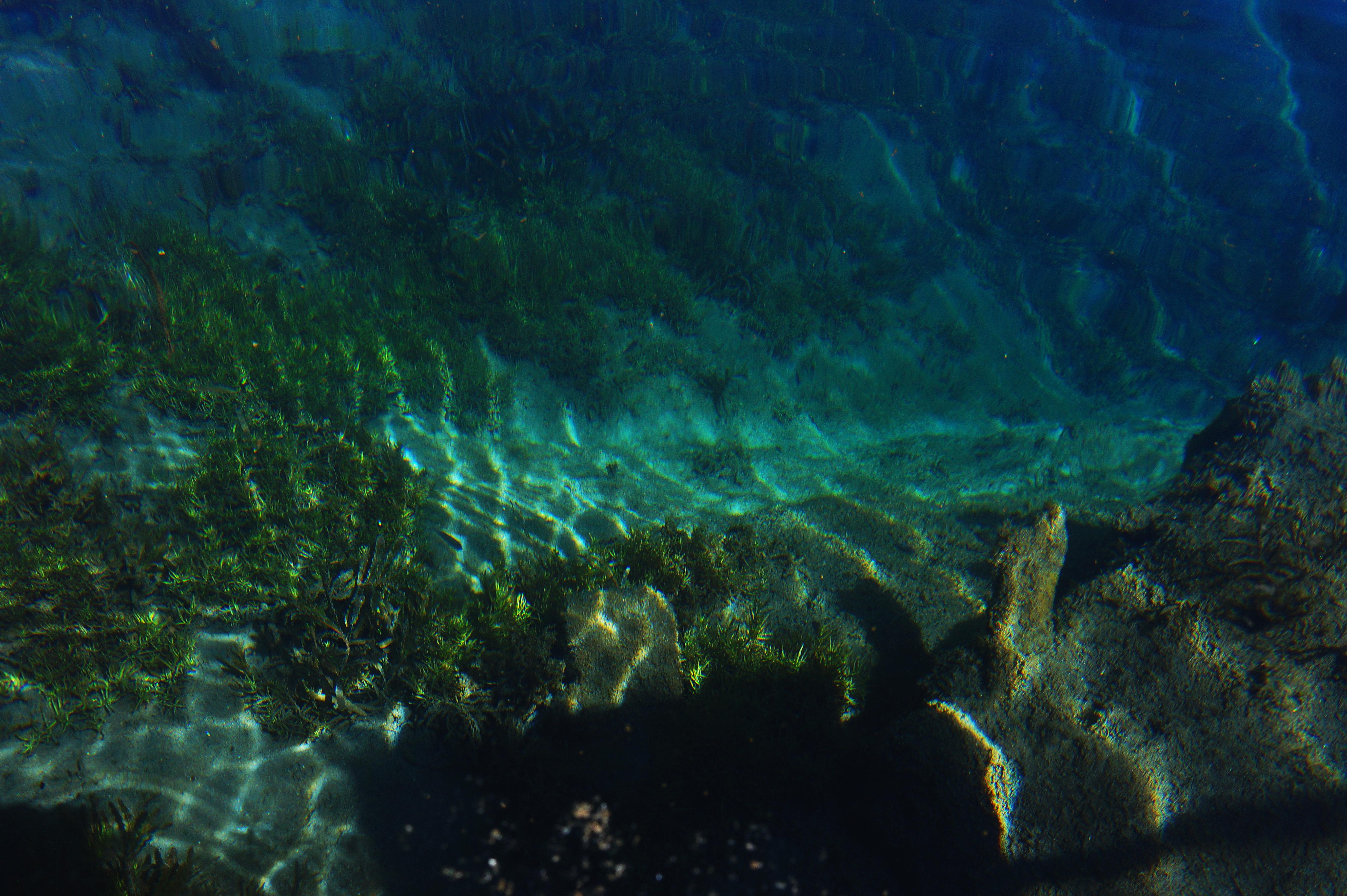 Озерця «Вікнини», Гусятинський район, с. Вікно, північно-західна околиця